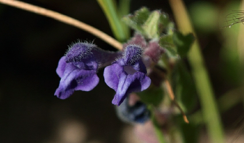 Skull Cap